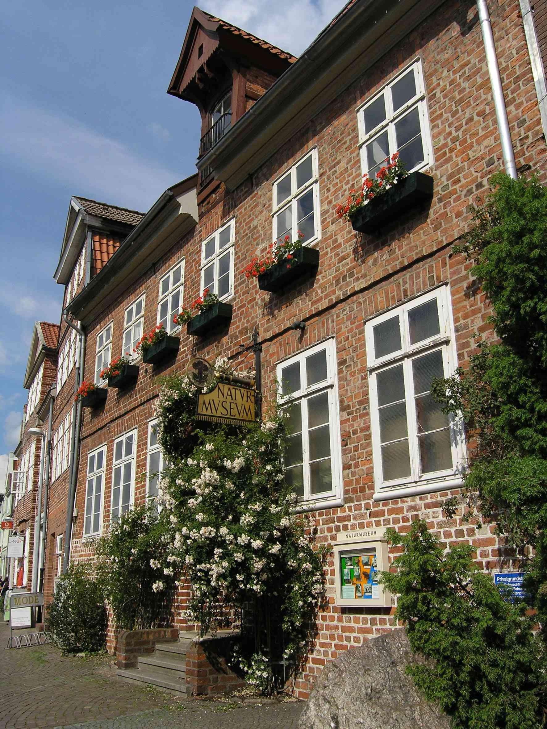 Naturmuseum Lüneburg, Salzstraße am Wasser 26